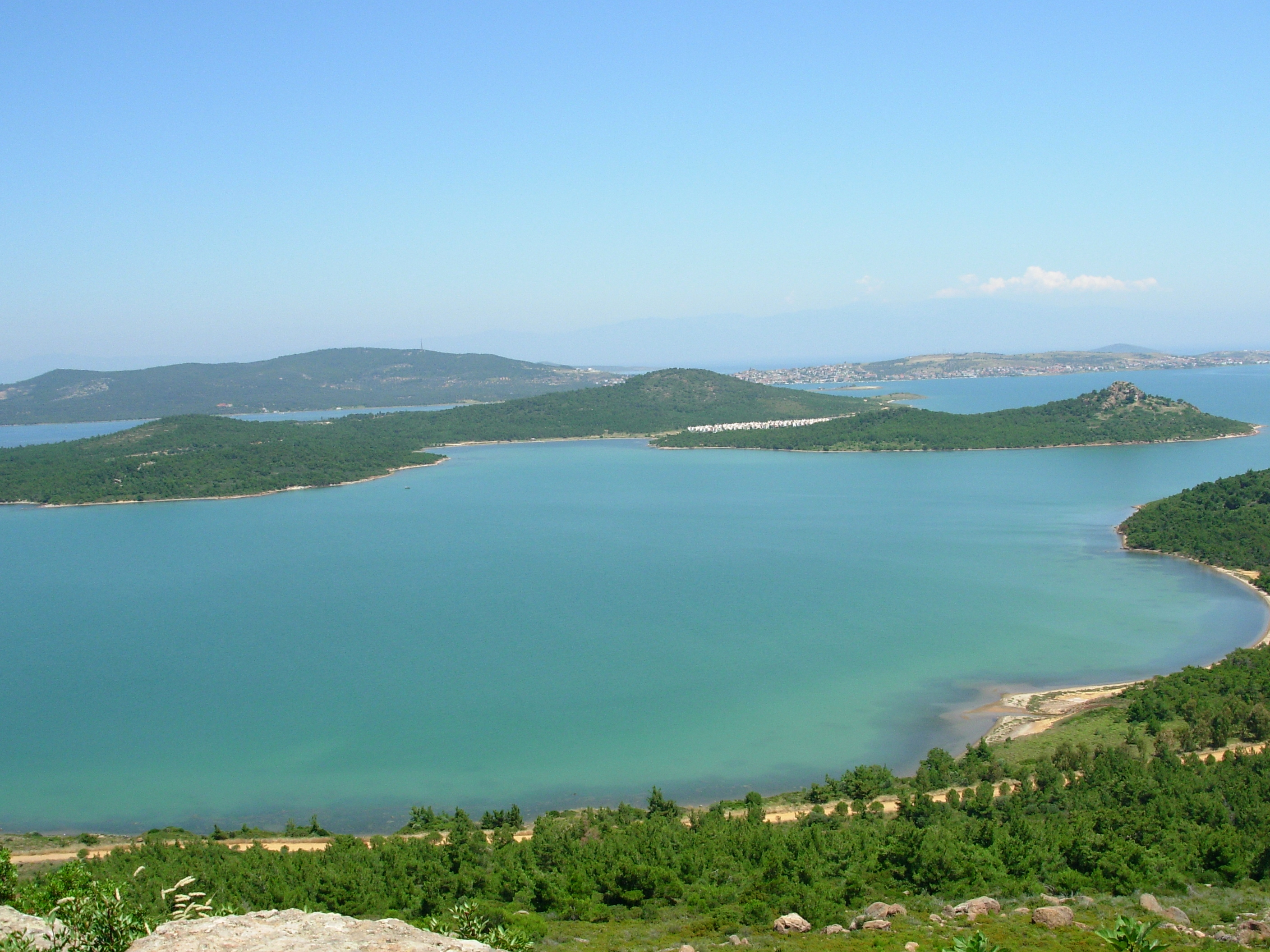 Şeytan Sofrası Ayvalık Turkey